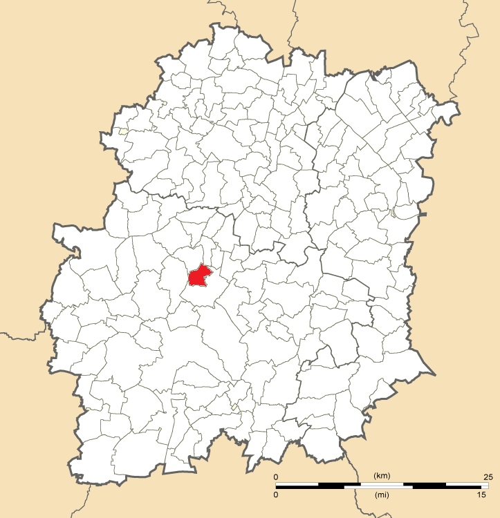 Carte de position de Chauffour-lès-Étréchy en Essonne (91)